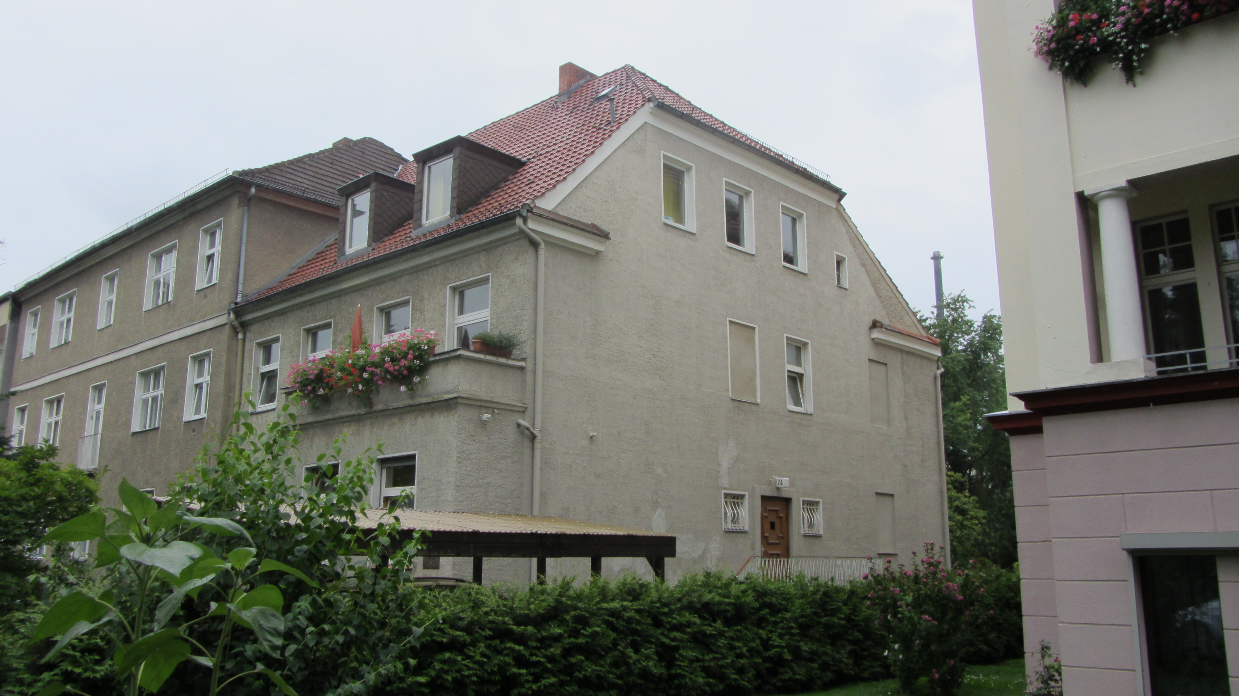 Wohnung von Beck in Berlin, Lichterfelde, Goethestr. 24